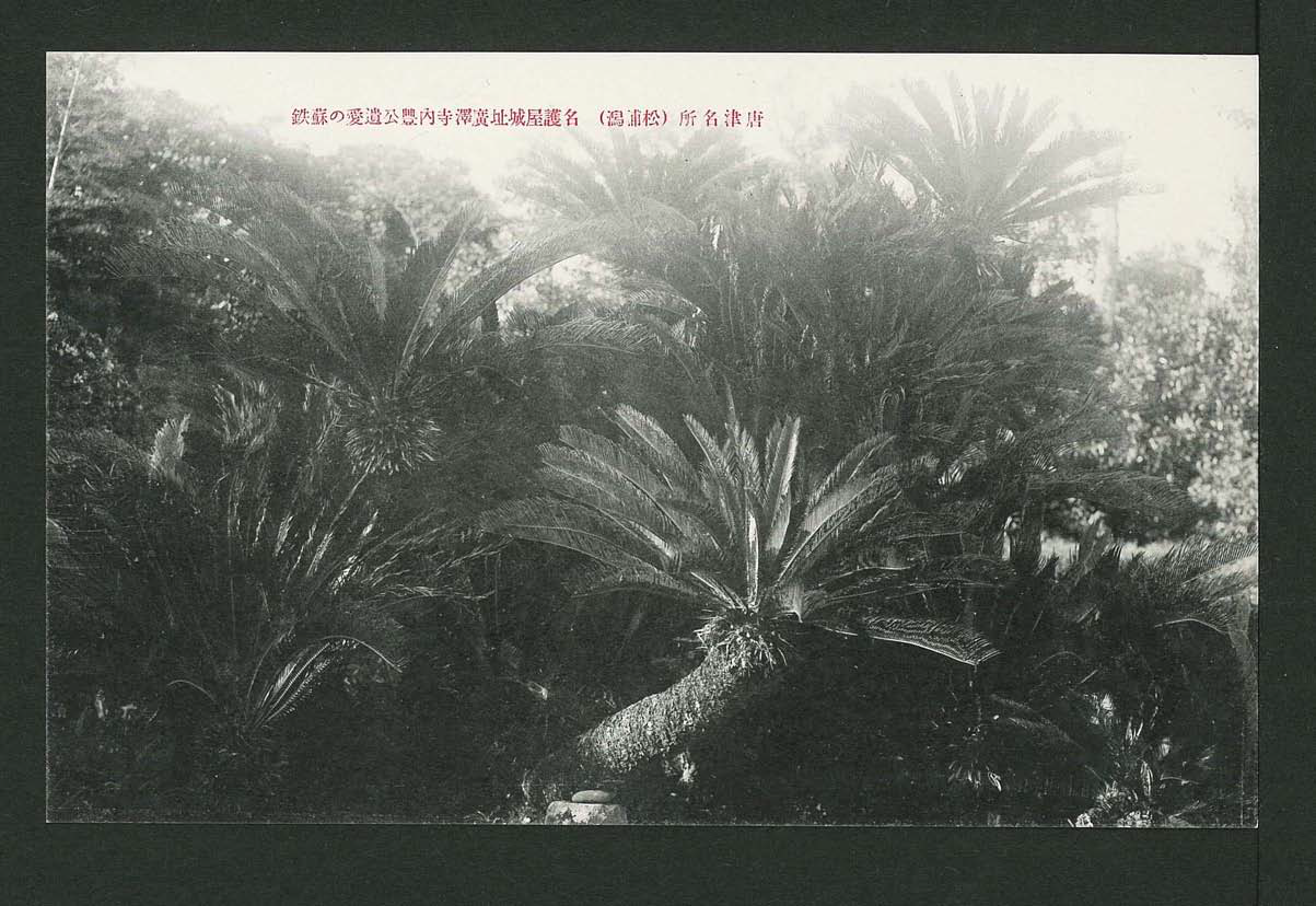 絵葉書のシリーズ『最も新しき唐津松浦潟名勝』のひとつ